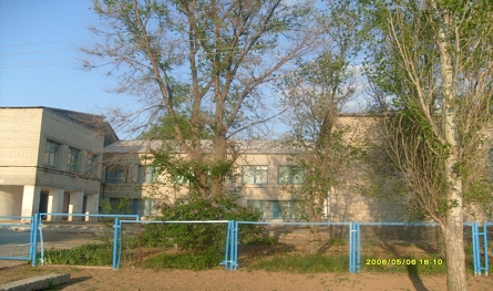 Солдатско-Степеновская средняя школа. Село Солдатско-Степное Быковского района Волгоградской области, Россия.